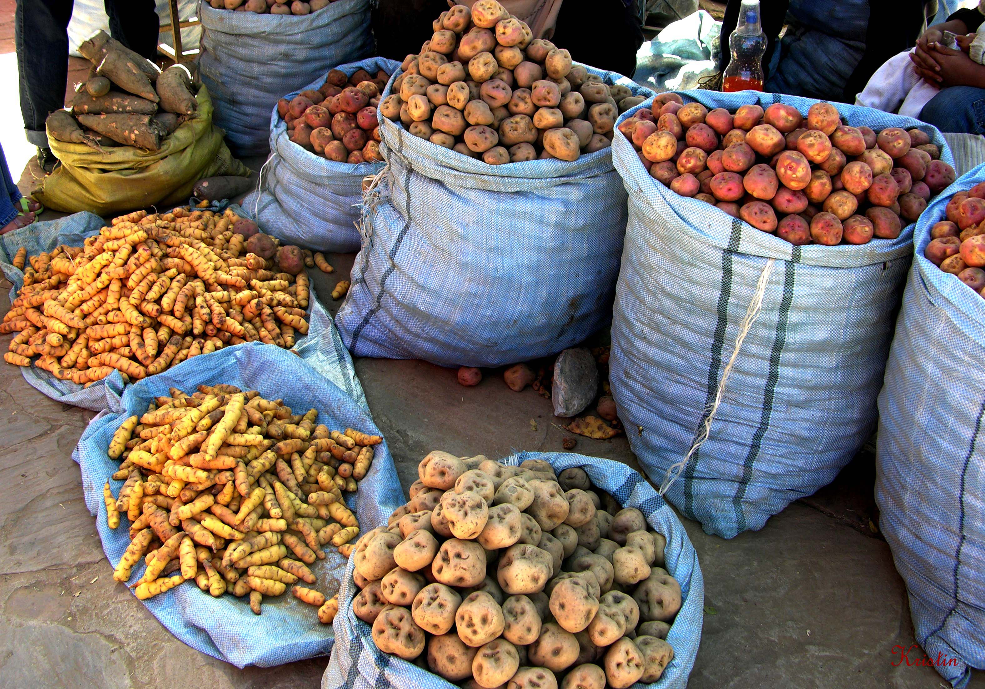 Pommes de terre indigènes au marché hebdomadaire de Cochabamba (Bolivie)